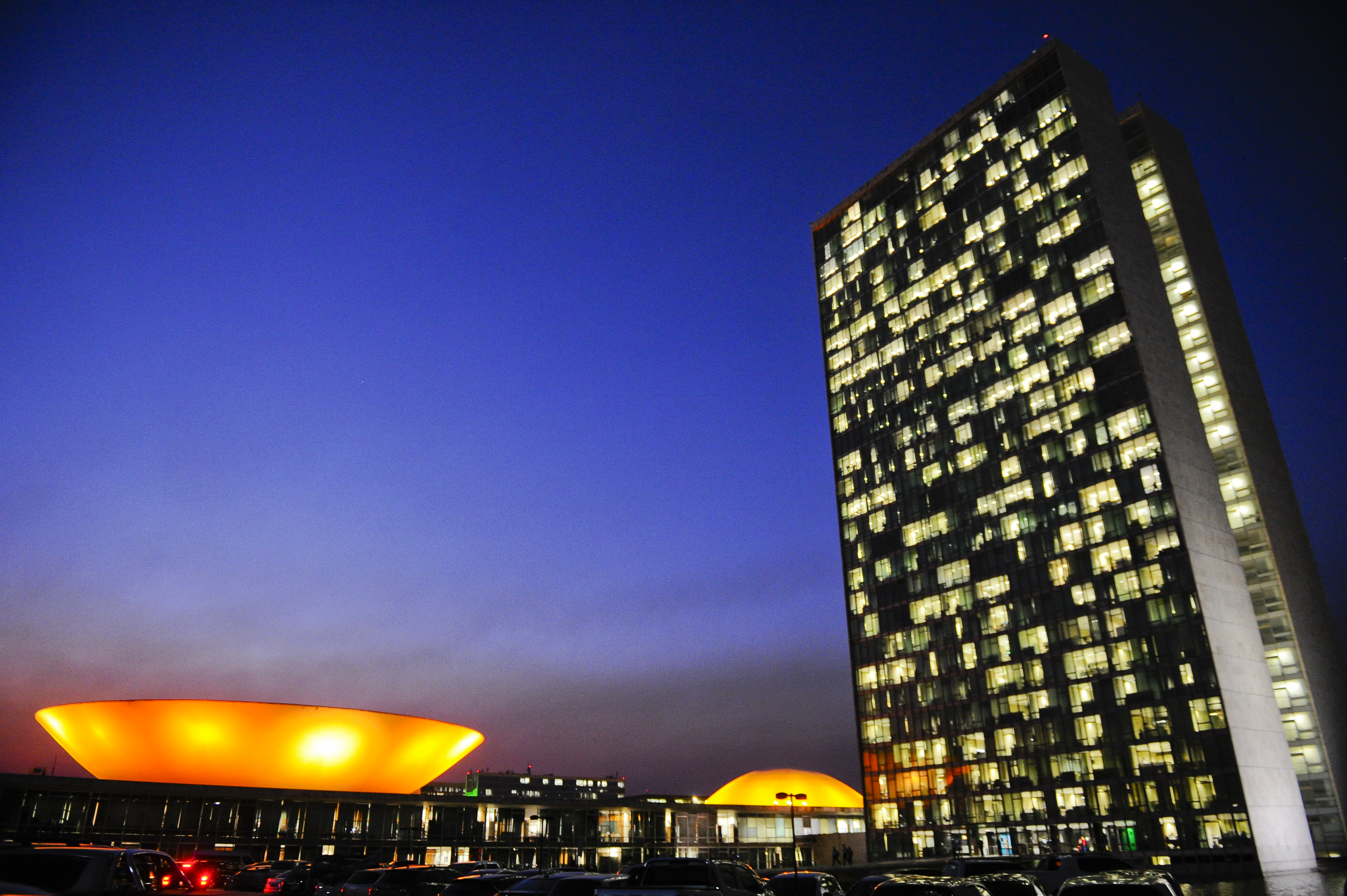 Congresso Nacional. Foto: Marcos Oliveira/Agência Senado